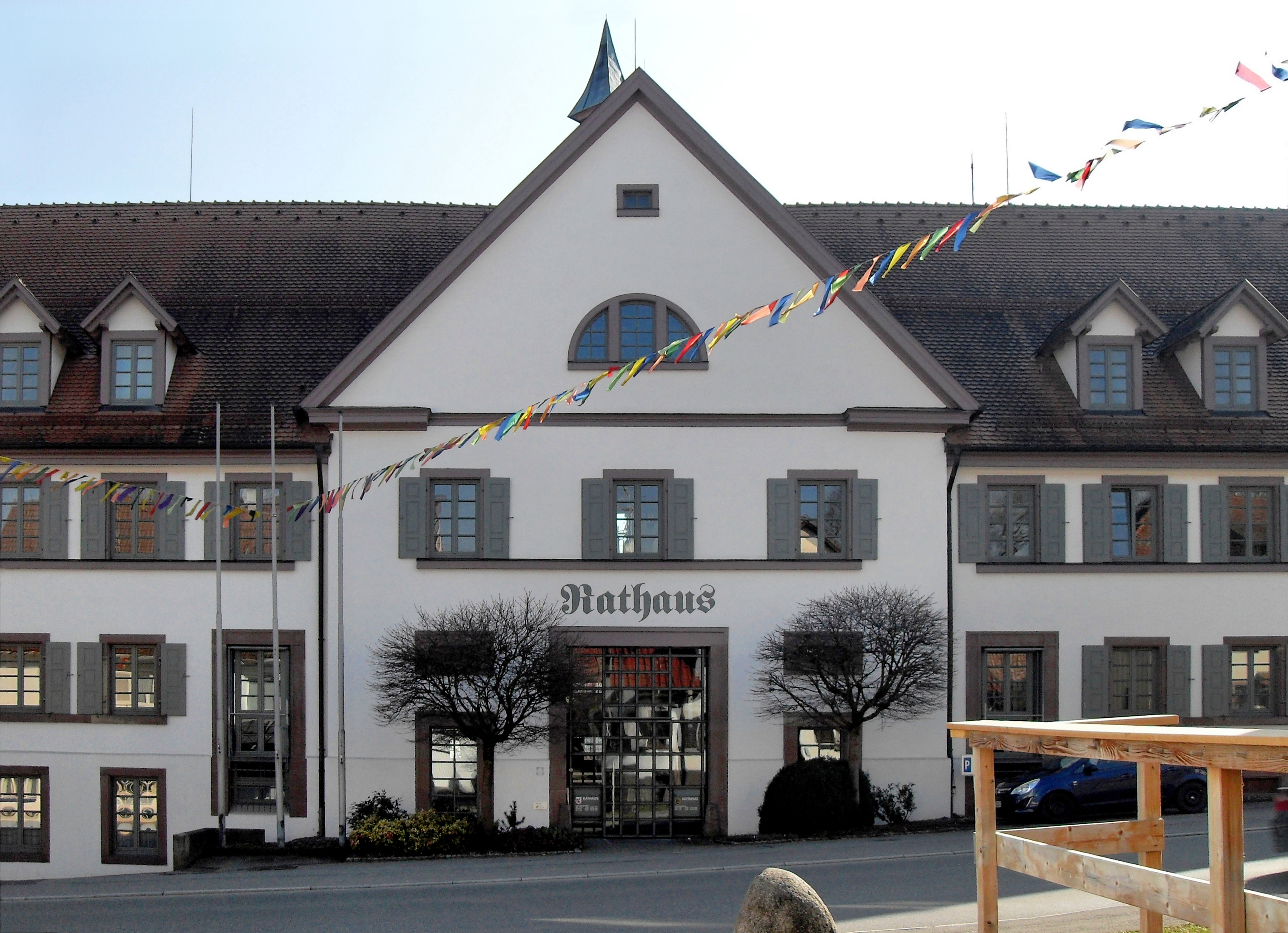 Rathaus mit Heimatmuseum in Dunningen